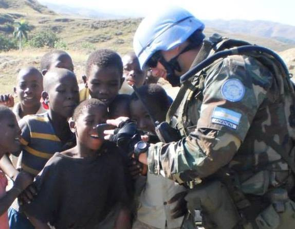 Soldado del contingente argentino de la MINUSTAH entretiene a algunos niños, 2012.